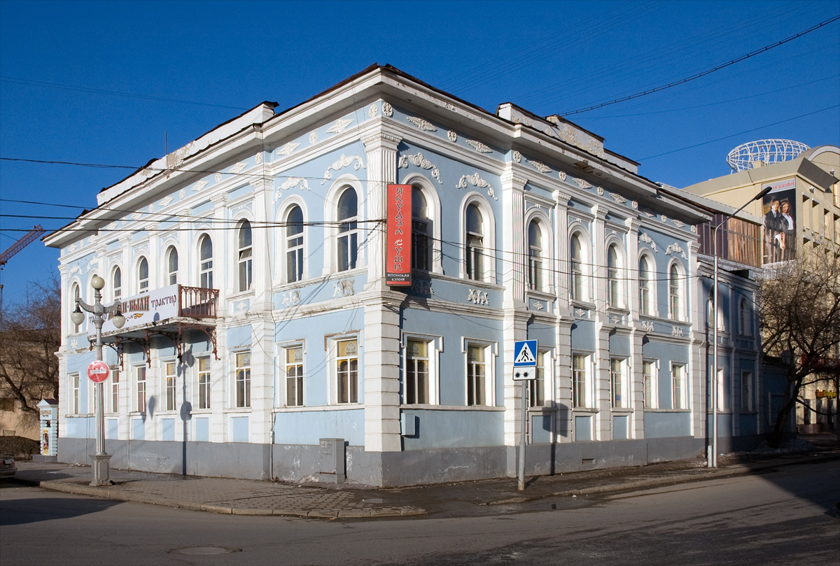 Набережная реки Ушайки д. 16 (Губернаторский дом)